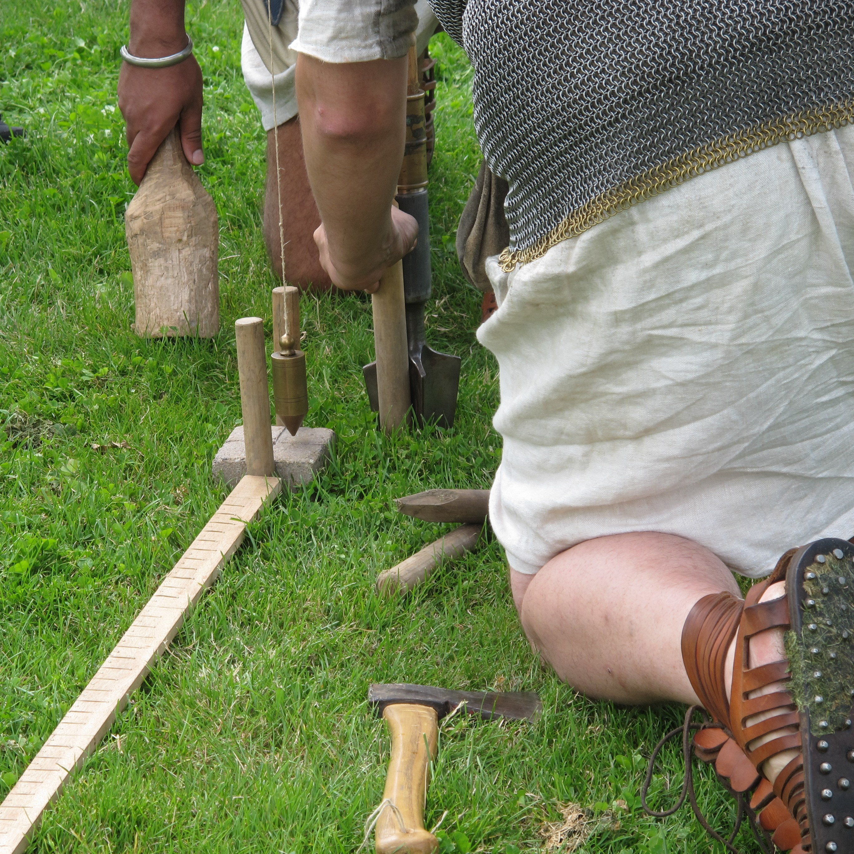 Stellen van de groma, landmeetkundig apparaat in oostwest-richting door Romeinse landmeter. Living history groep Pax Romana tijdens project Soldatencamping Matilo, Leiden augustus 2017.